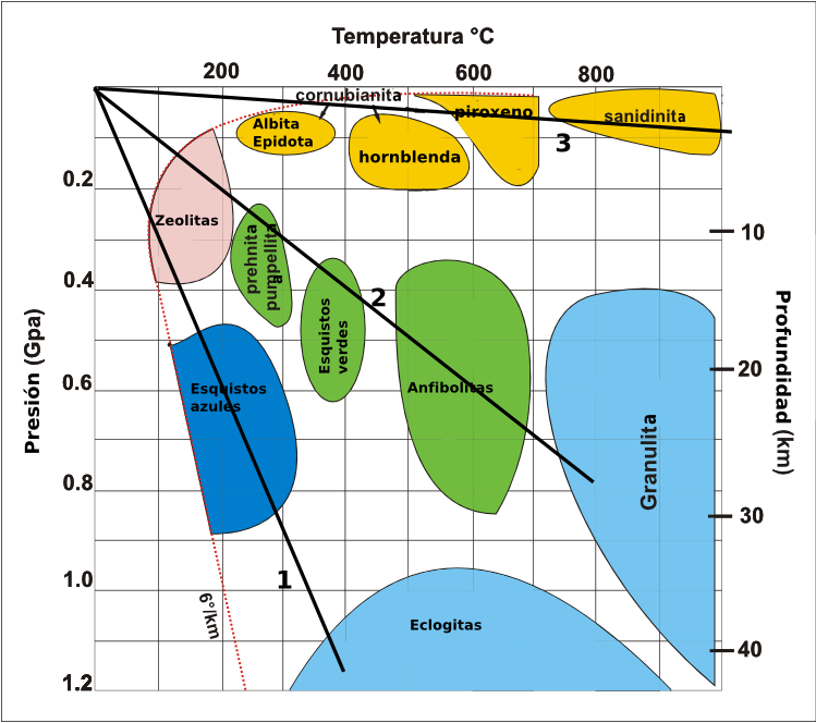 Diagrama de facies metamórficas según temperatura, presión y profundidad